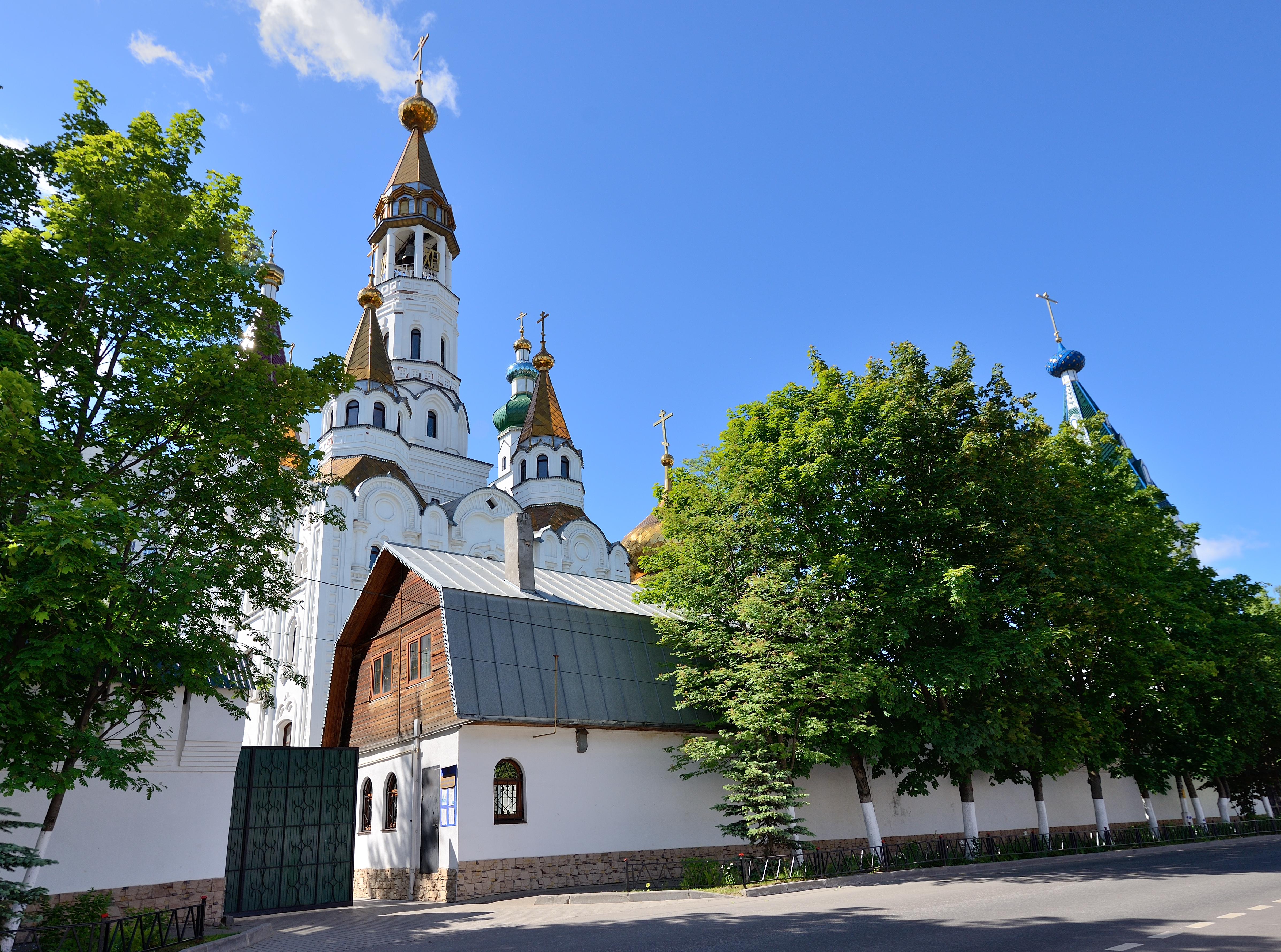 Храм Боголюбской иконы Божией Матери. Пушкино, Московской, Московская епархия, Пушкинское благочиние